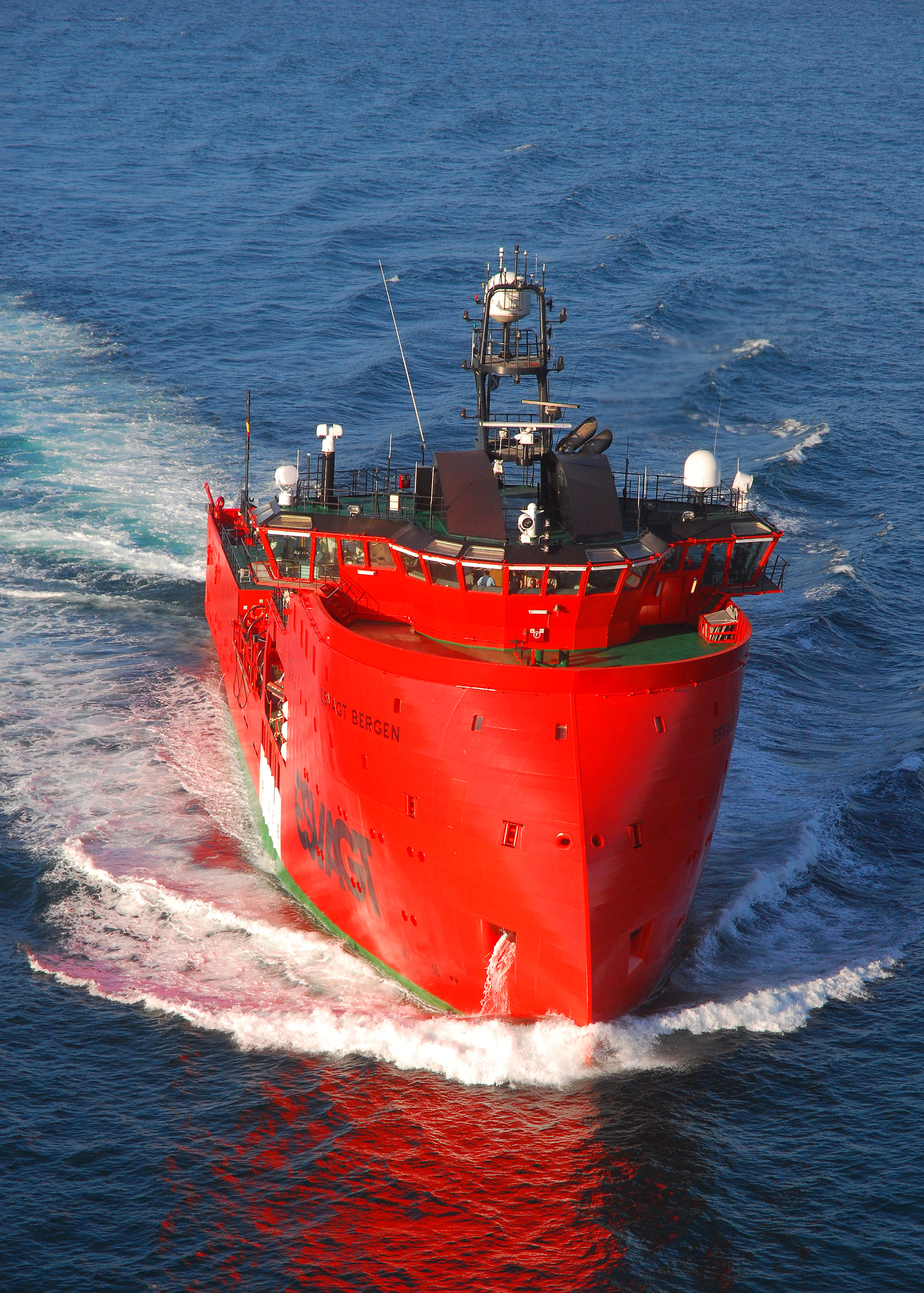 BB 3 SUPPLY 03